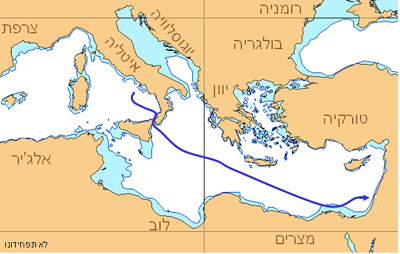 אוניית המעפילים לא תפחידונו - מסלול